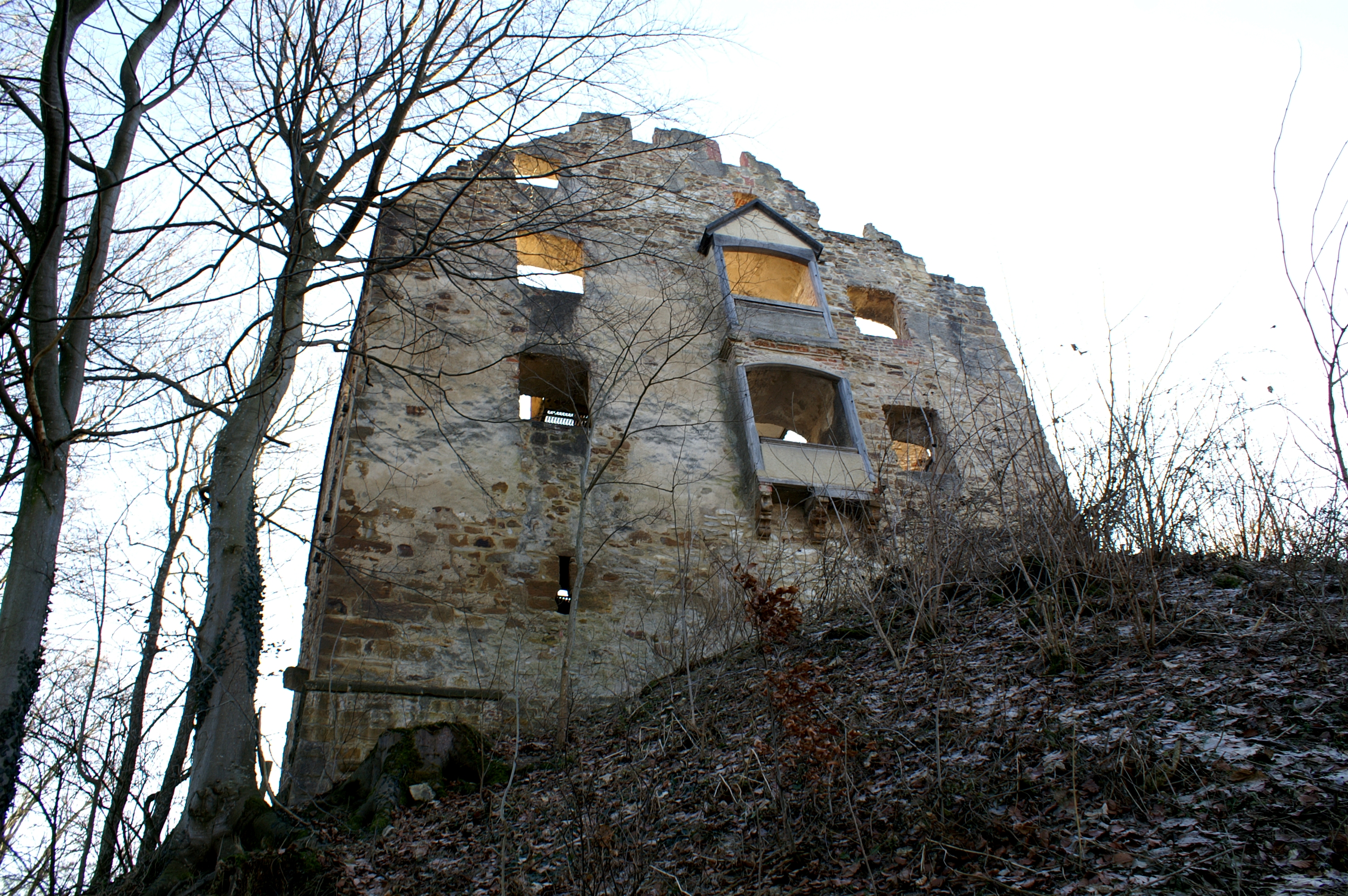 Außenansicht der Ruine des herrschaftlichen Gebäudes von Burg Scharfenberg über Donzdorf